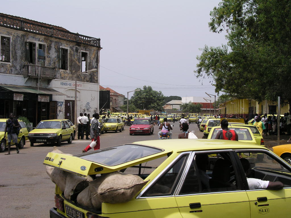 O mar de táxis junto do mercado, na capital.